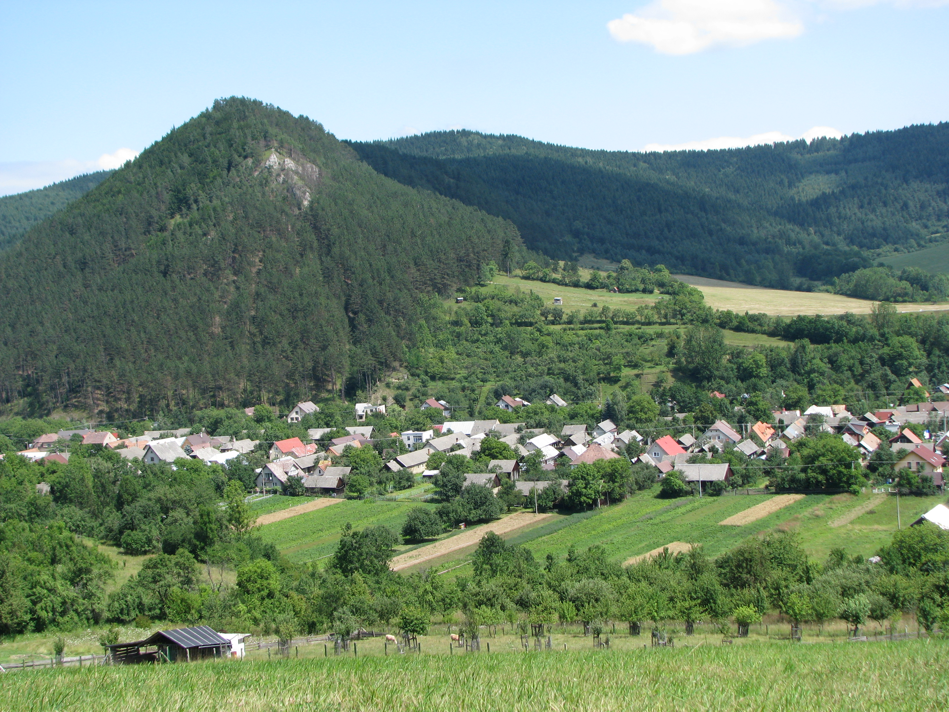 Pohled na vesničku Stupné